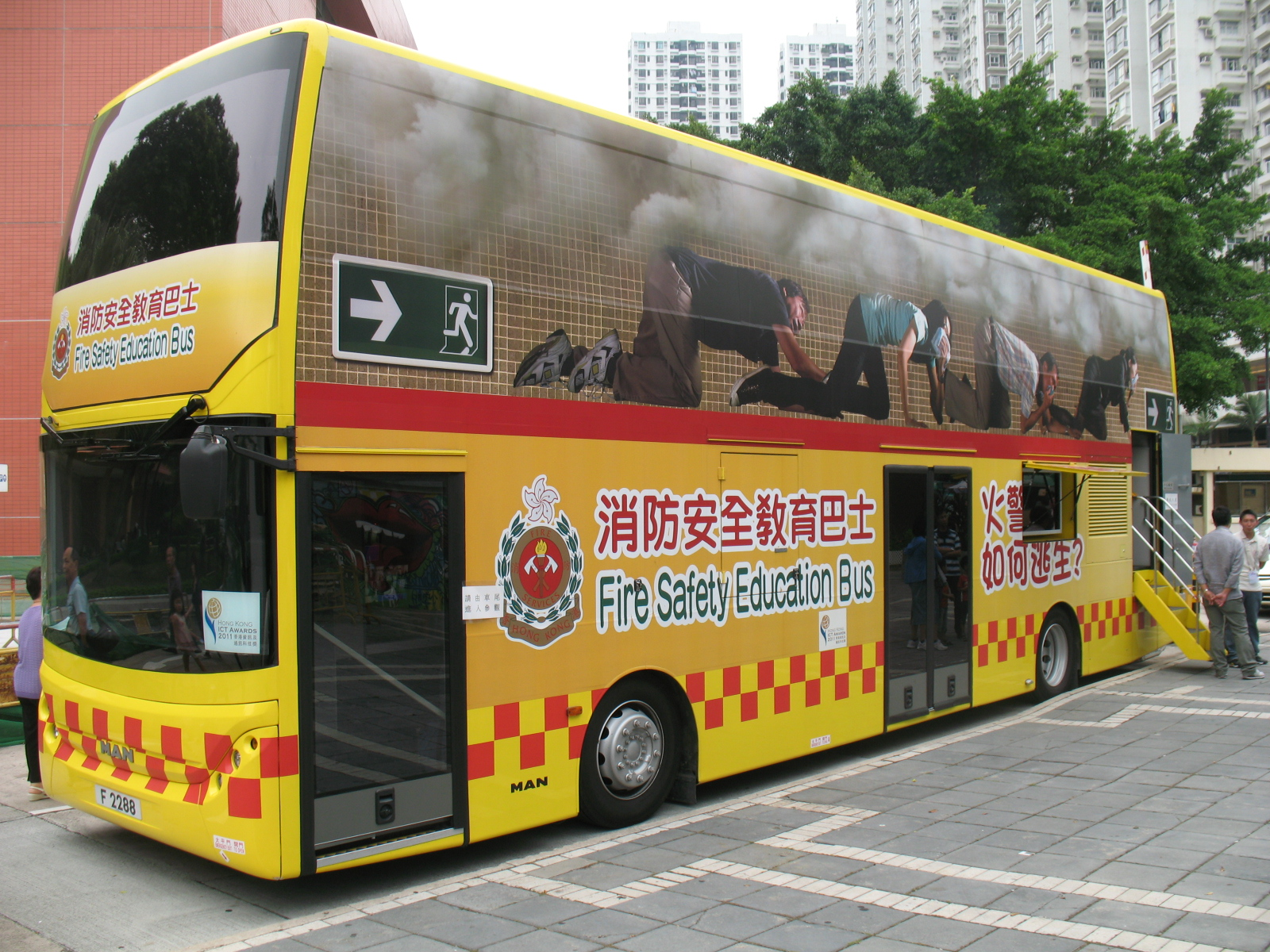 中文（香港）: 全球第一輛以消防安全教育用途的雙層巴士，名為消防安全教育巴士，屬於香港消防處，主要作用是推廣消防安全教育，通行全香港各區，牌號是F2288，此車輛榮獲「2011年度香港資訊及通訊科技獎」得主之一。